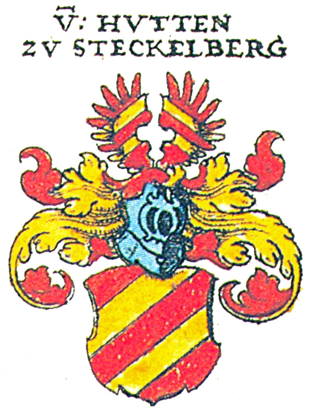 Ritterschaft und Adel in Franken von Hutten zu Steckelberg